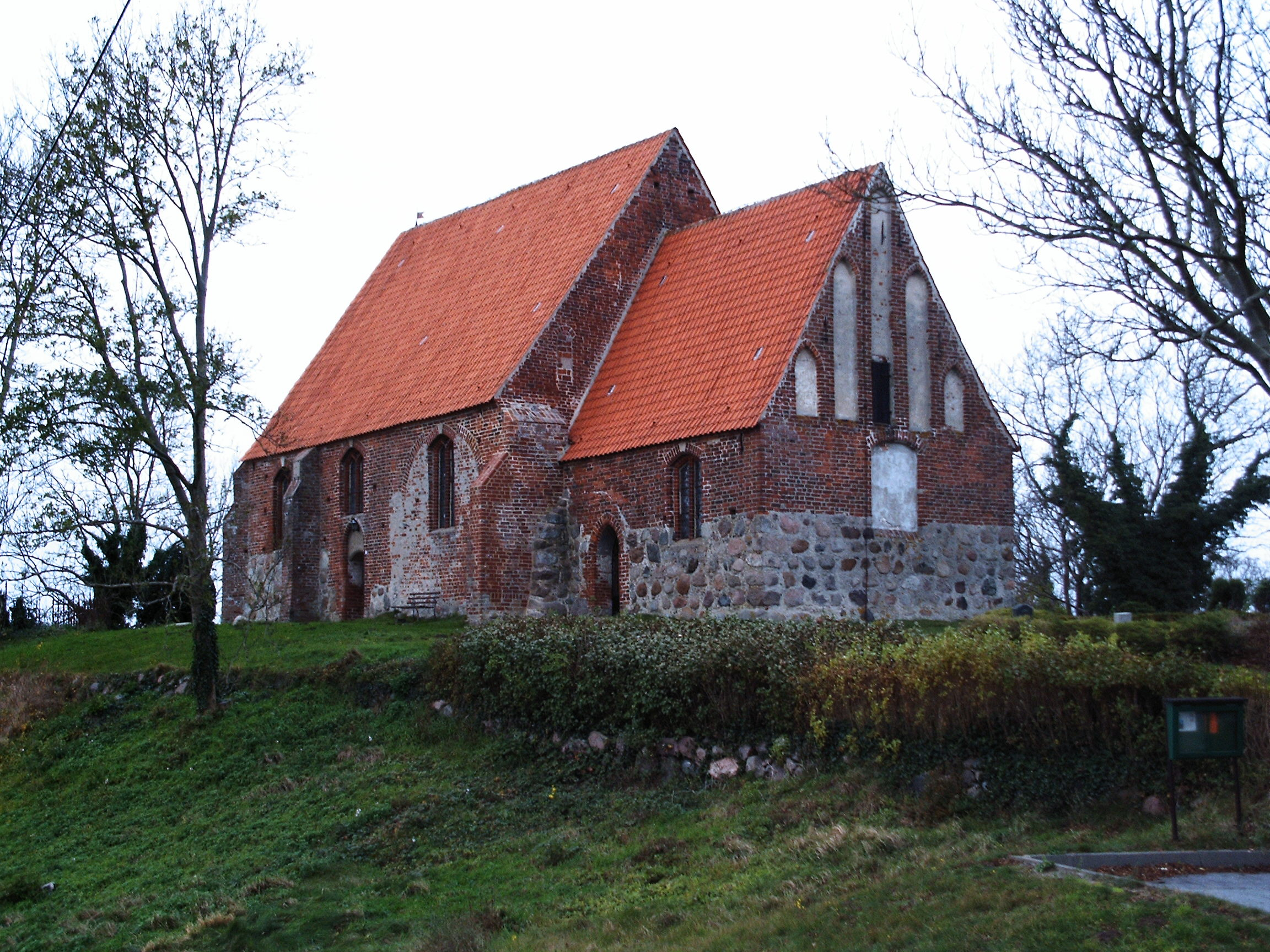 Kirche von Neuenkirchen auf Rügen. Privatfoto von November 2007